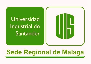 Uis sede Malaga